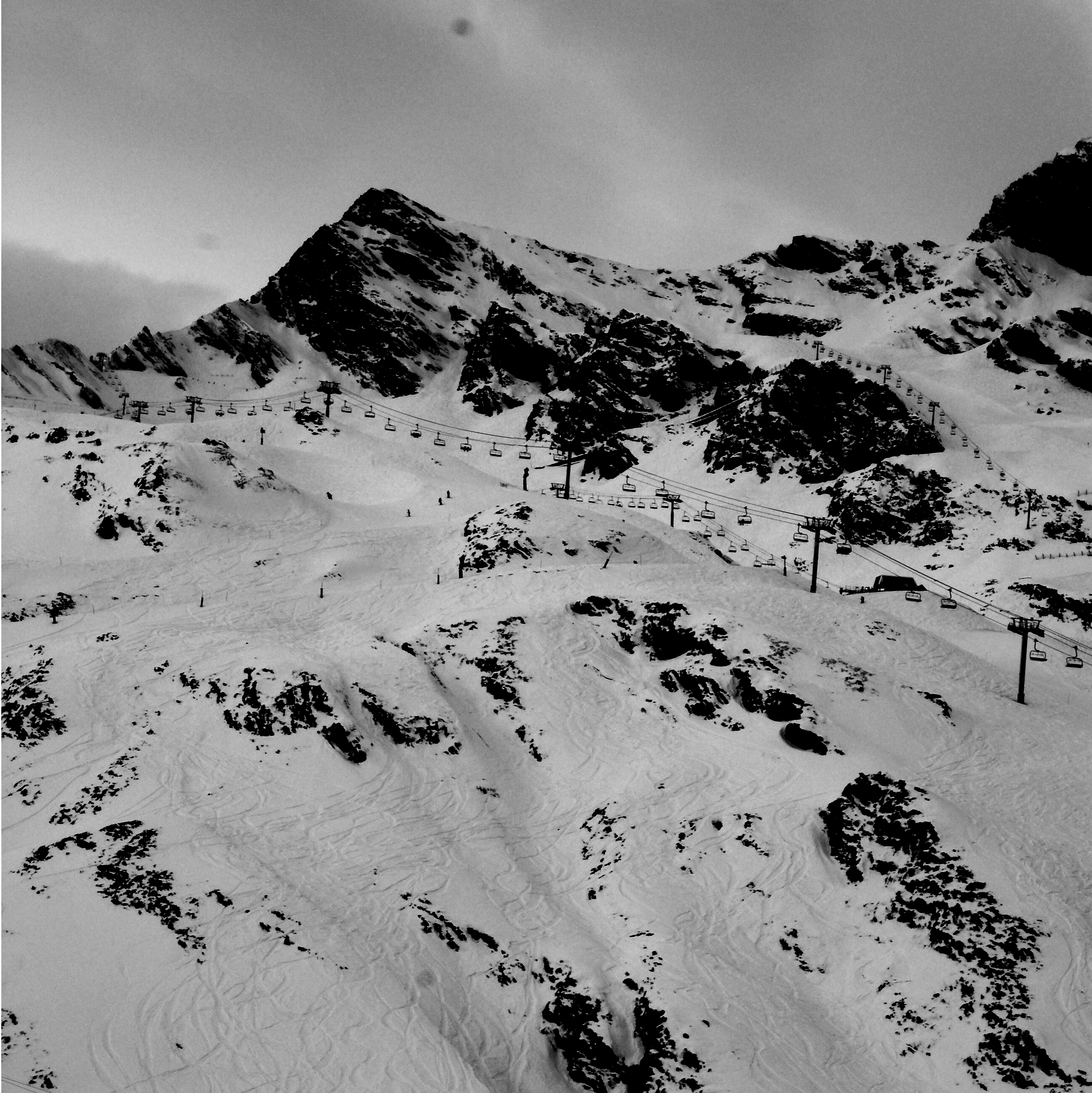 Photo de la station de Cauterets prise depuis l'arrivée des télécabines en 2010.